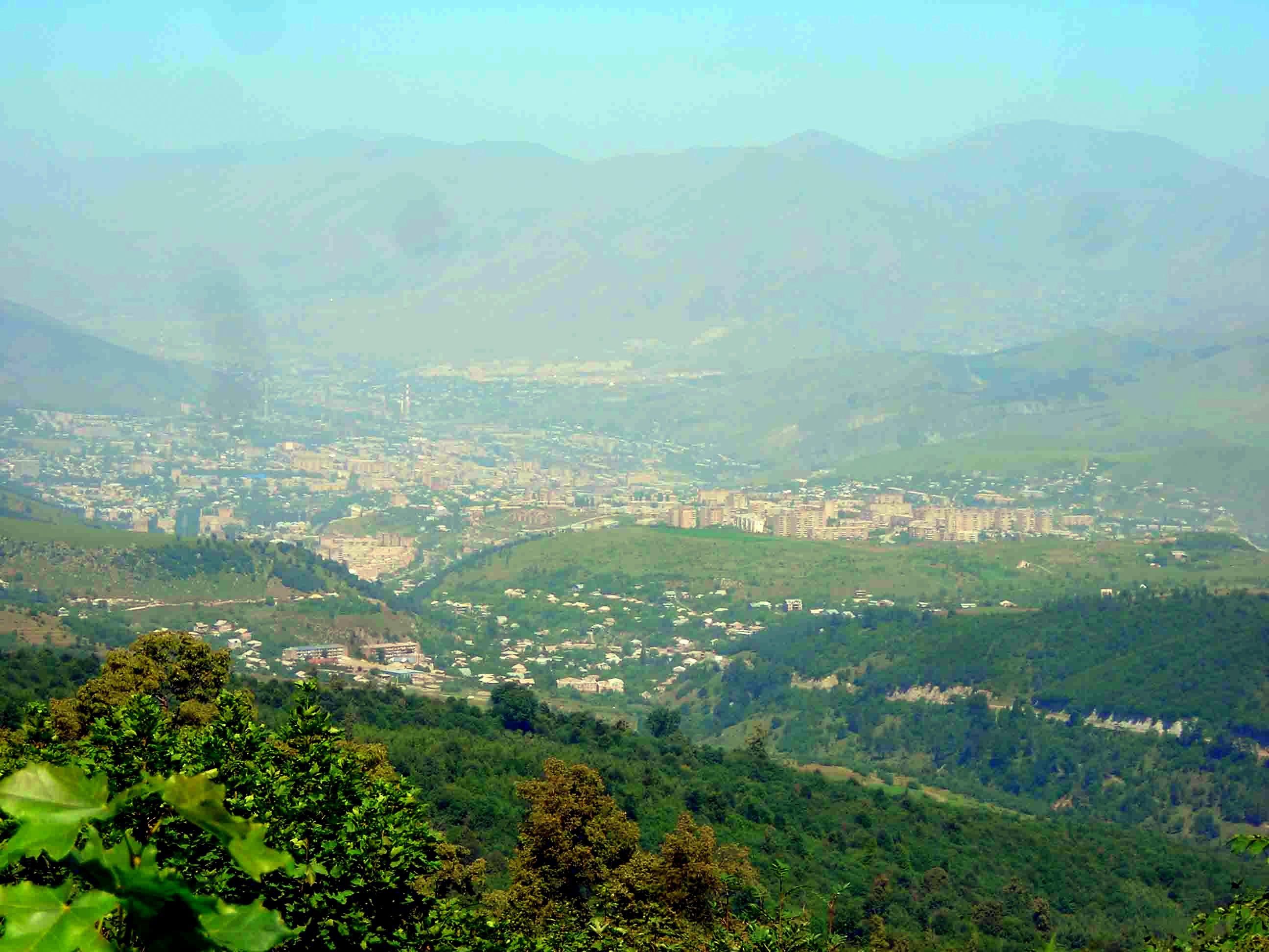 Վանաձոր քաղաքի հեռապատկերը հարավ-արևելքից